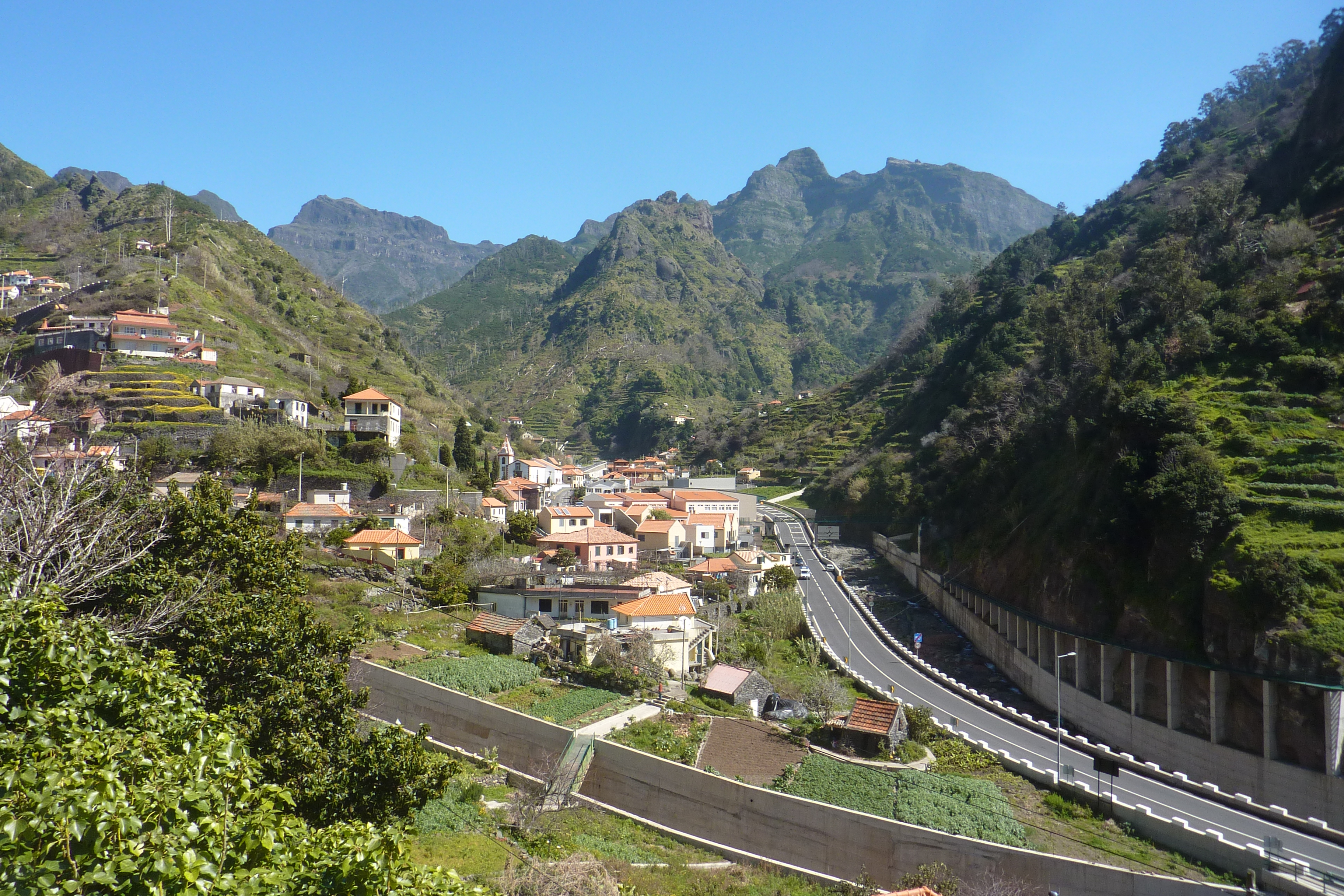 Madeira - Serra De Agua